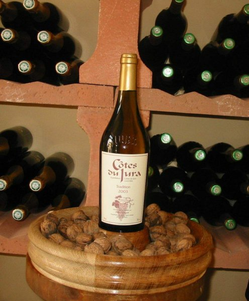 Savagnin du Jura